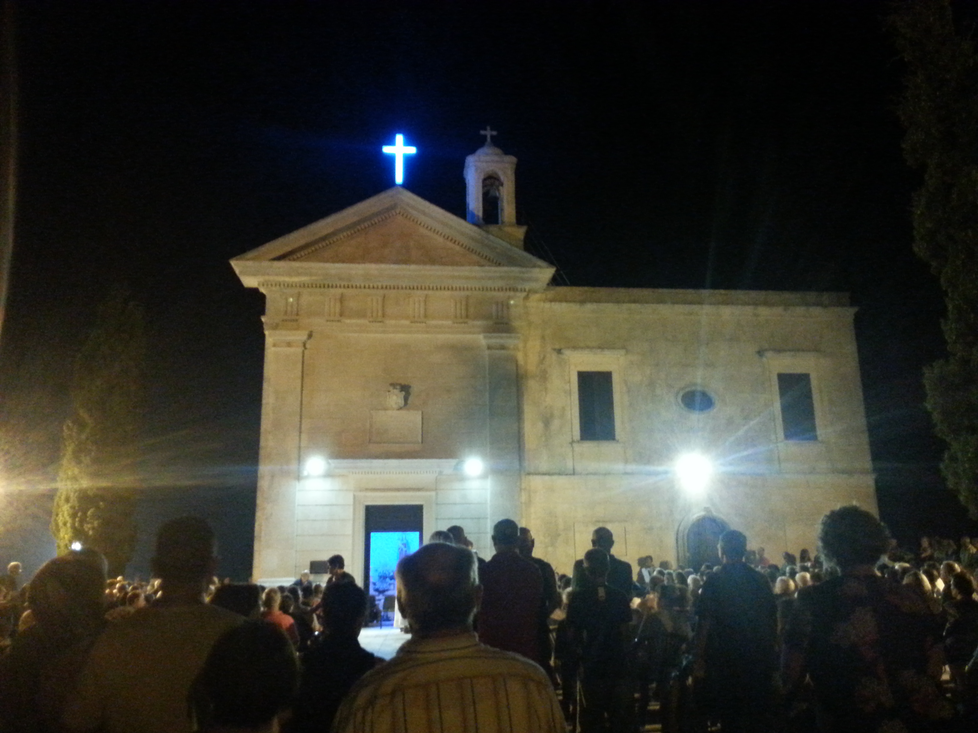 Atrio Santuario di Belvedere nella notte delle Grazie,Carovigno